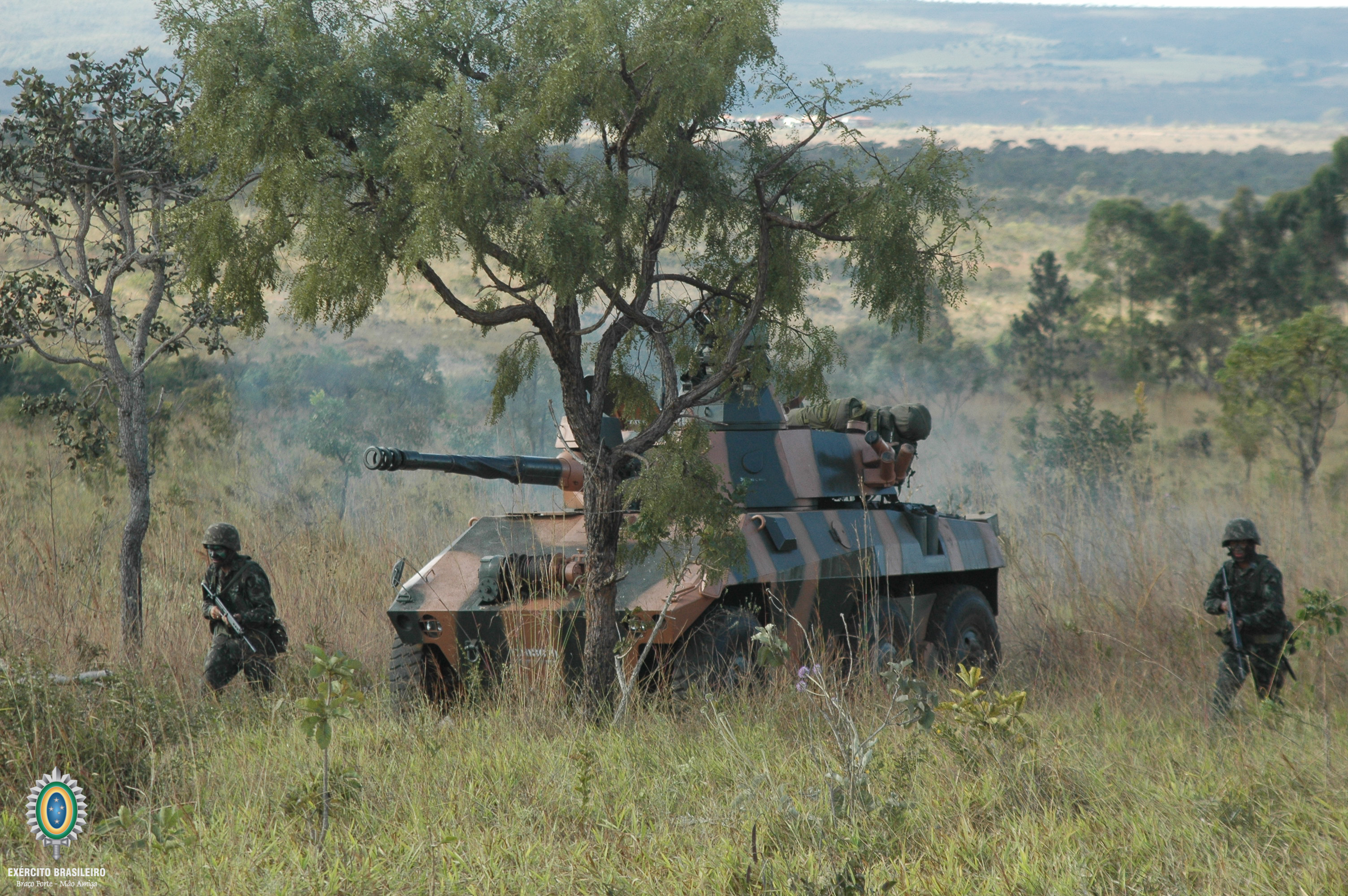 Cavalaria